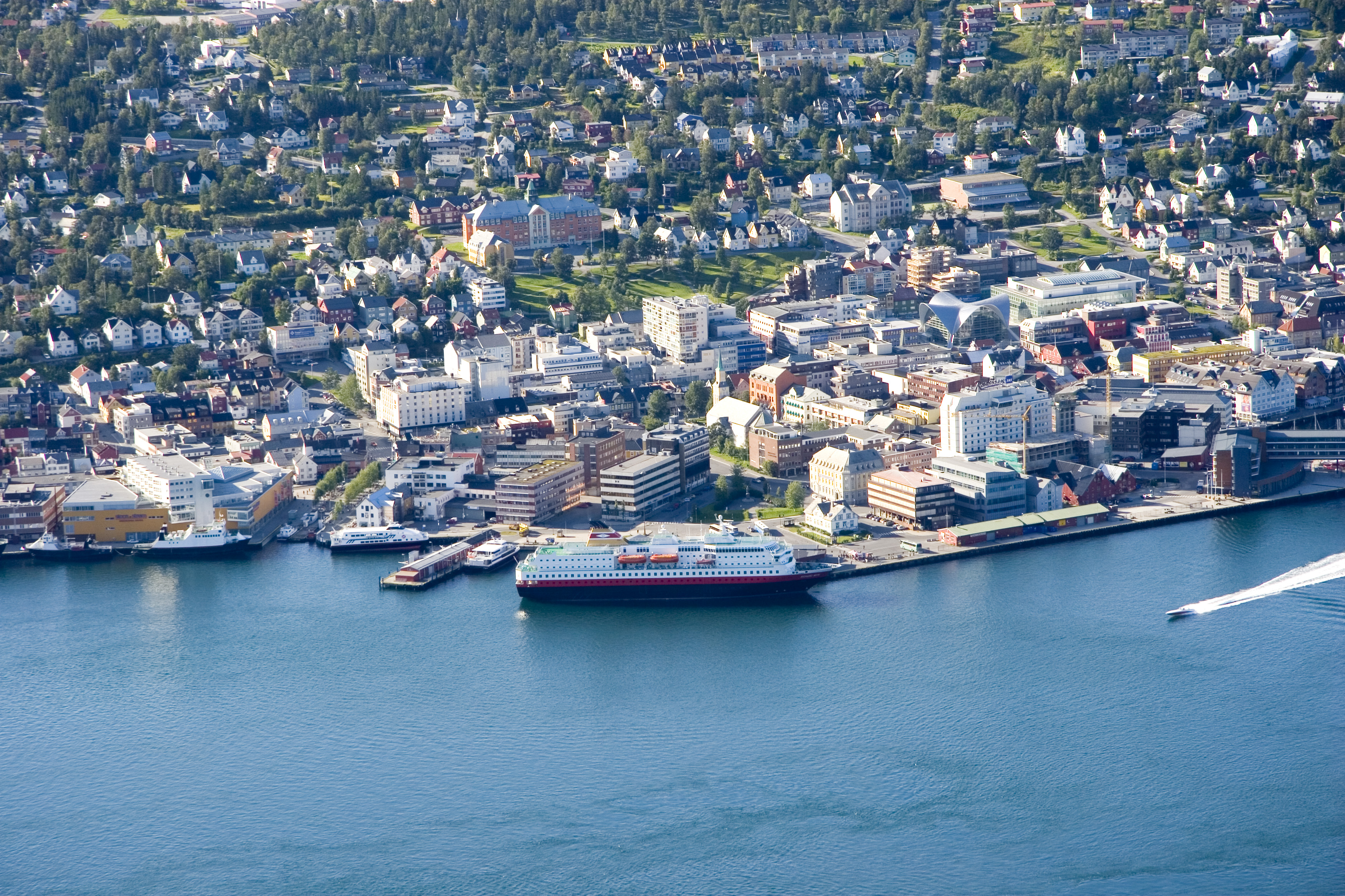 Blick vom Storsteinen auf die Innenstadt von Tromsø mit Hurtigrutenschiff "Richard With"